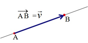 Esquema de un vector como un segmento de recta entre dos puntos A y B